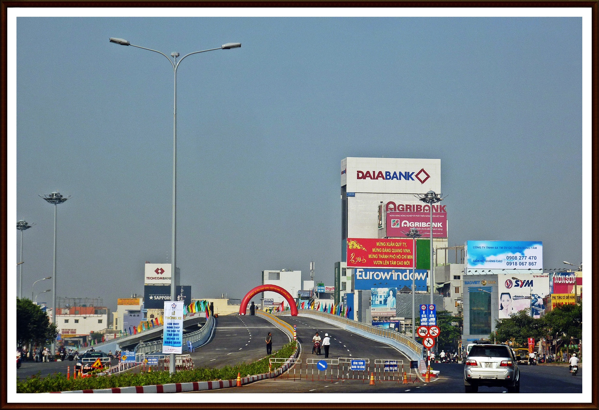 Cầu vượt bằng thép thứ hai tại thành phố Hồ Chí Minh trước giờ khánh thành.